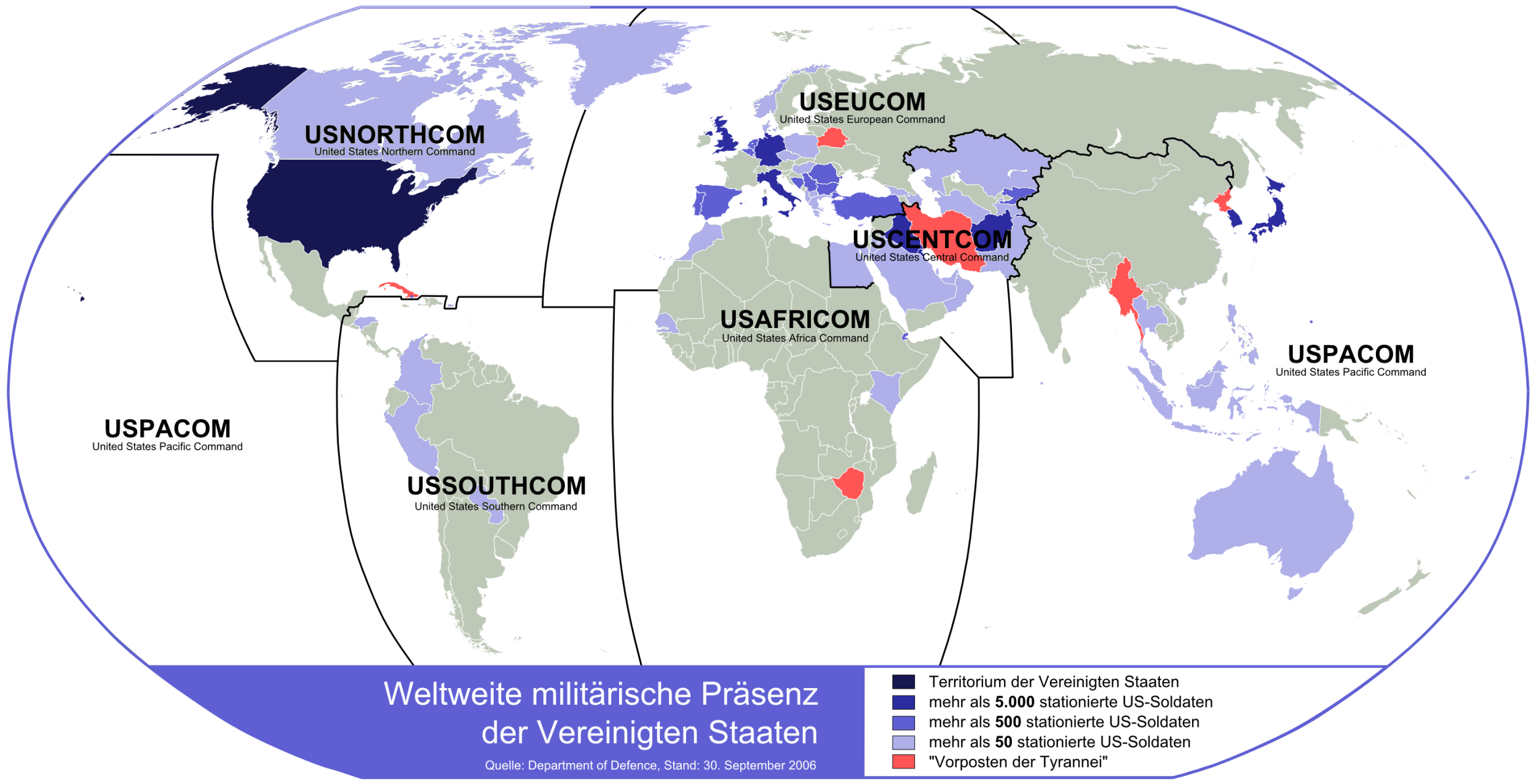 Weltweite militärische Präsenz der Vereinigten Staaten (Stand: 30. September 2006), die "Vorposten der Tyrannei", sowie die Grenzen der Unified Combatant Commands ab 2008